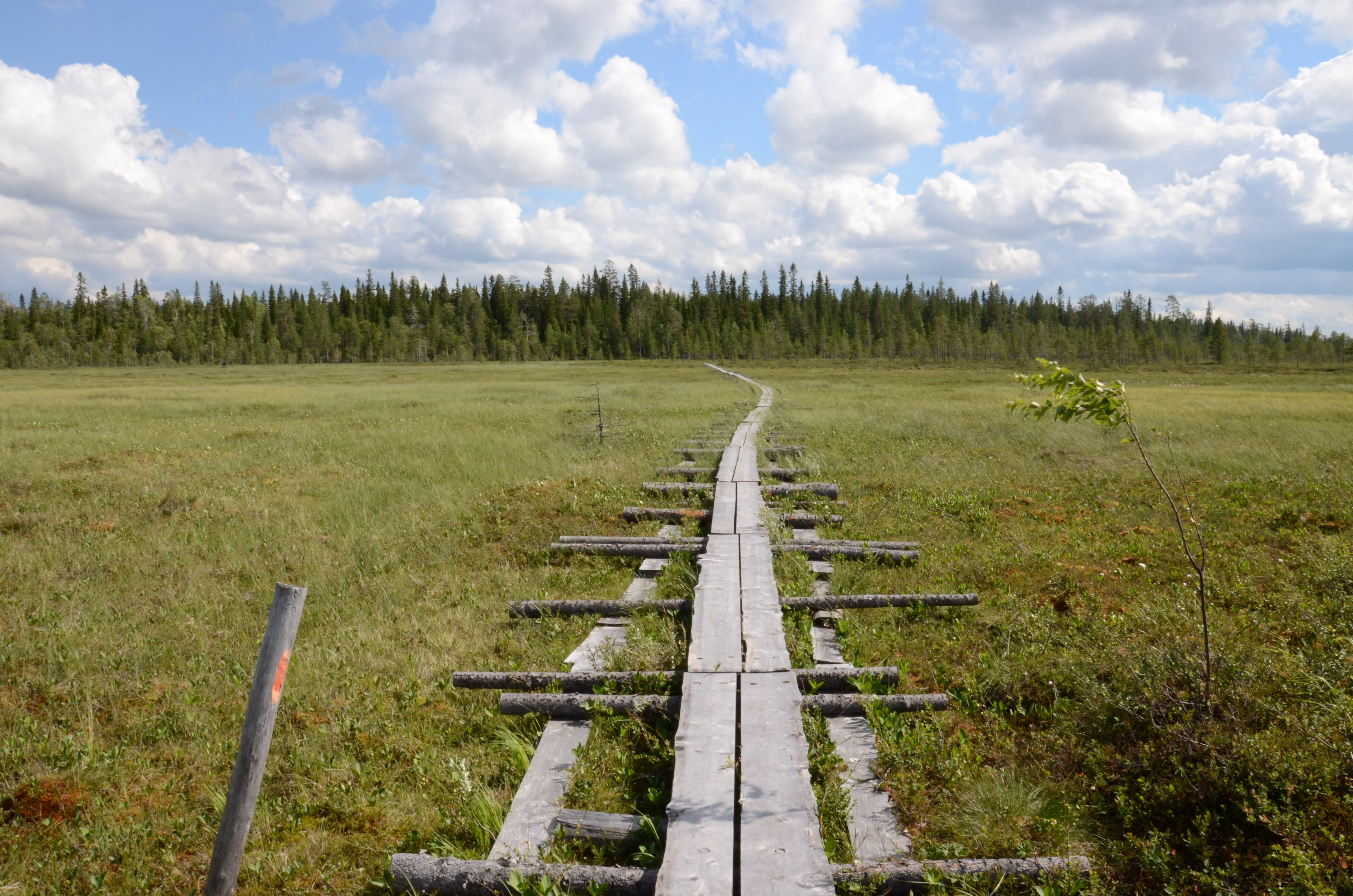 Martimoaavan soidensuojelualue